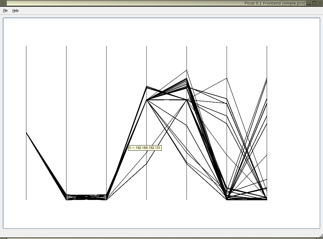 Picviz Frontend